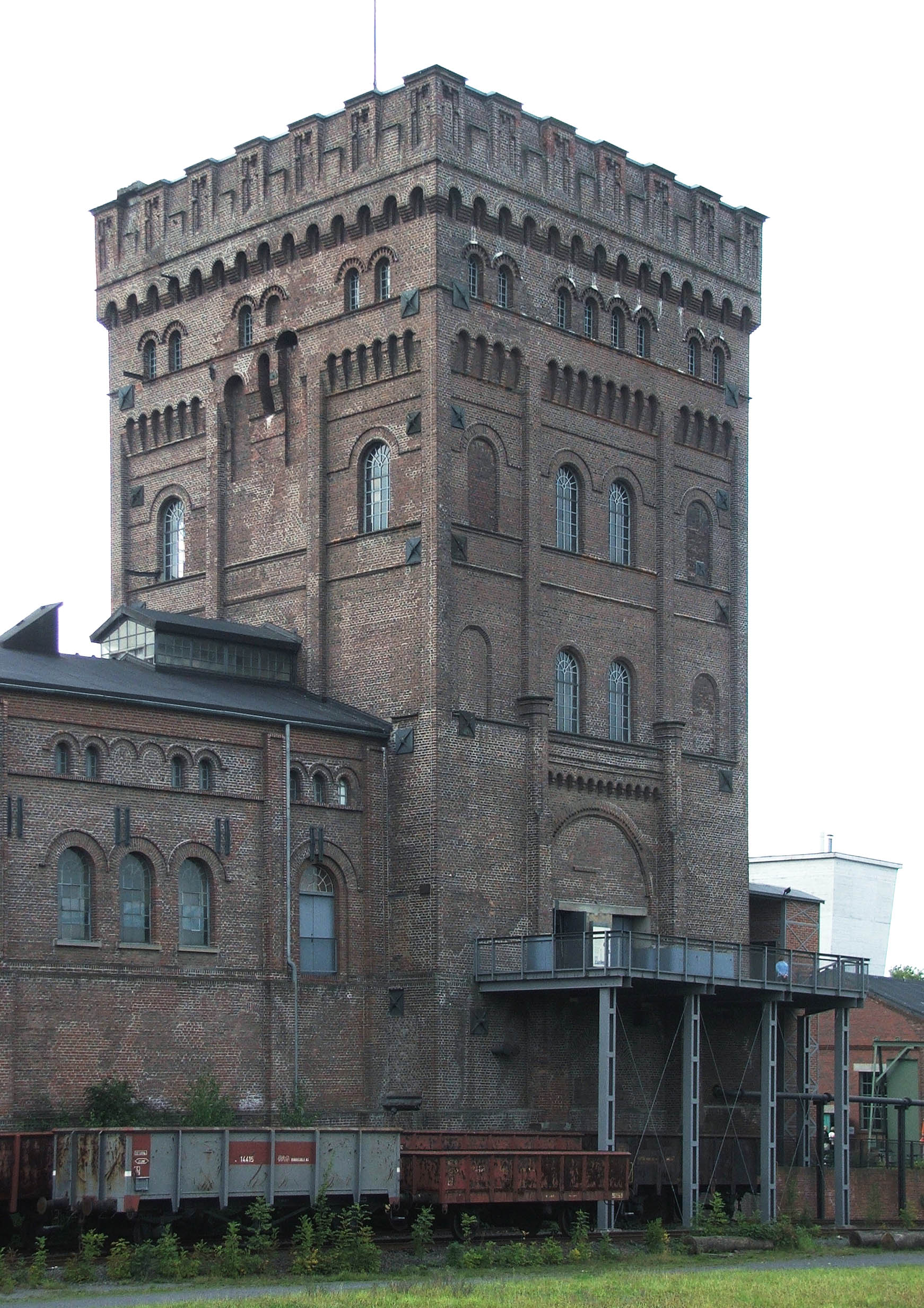 Zeche Hannover; Bild entzerrt